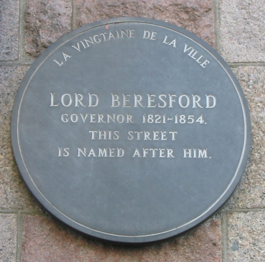 Nrf: Saint Hélyi, Jèrri